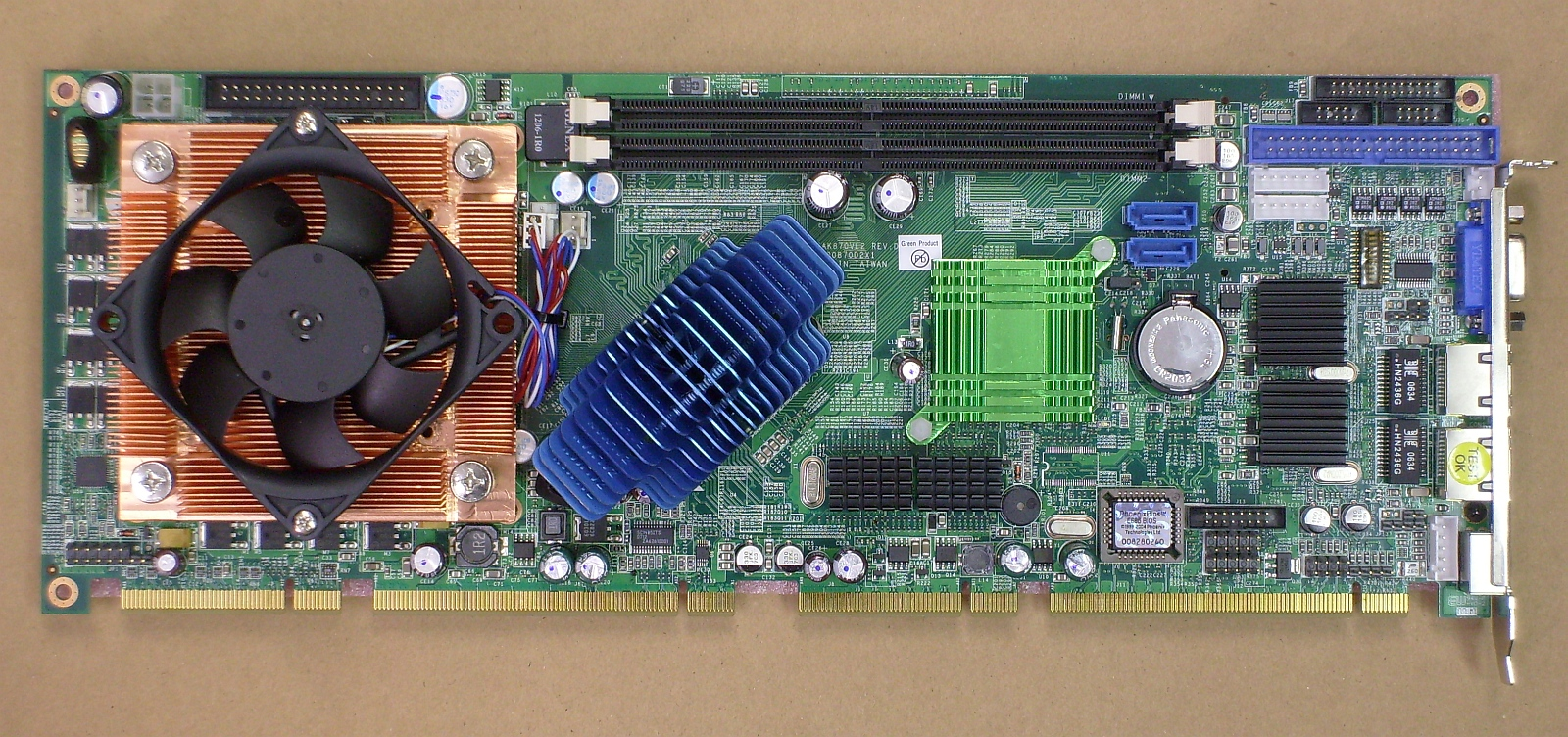 Slot cpu, CPU-Karte, PICMG1.3, Q965, S775, GLAN